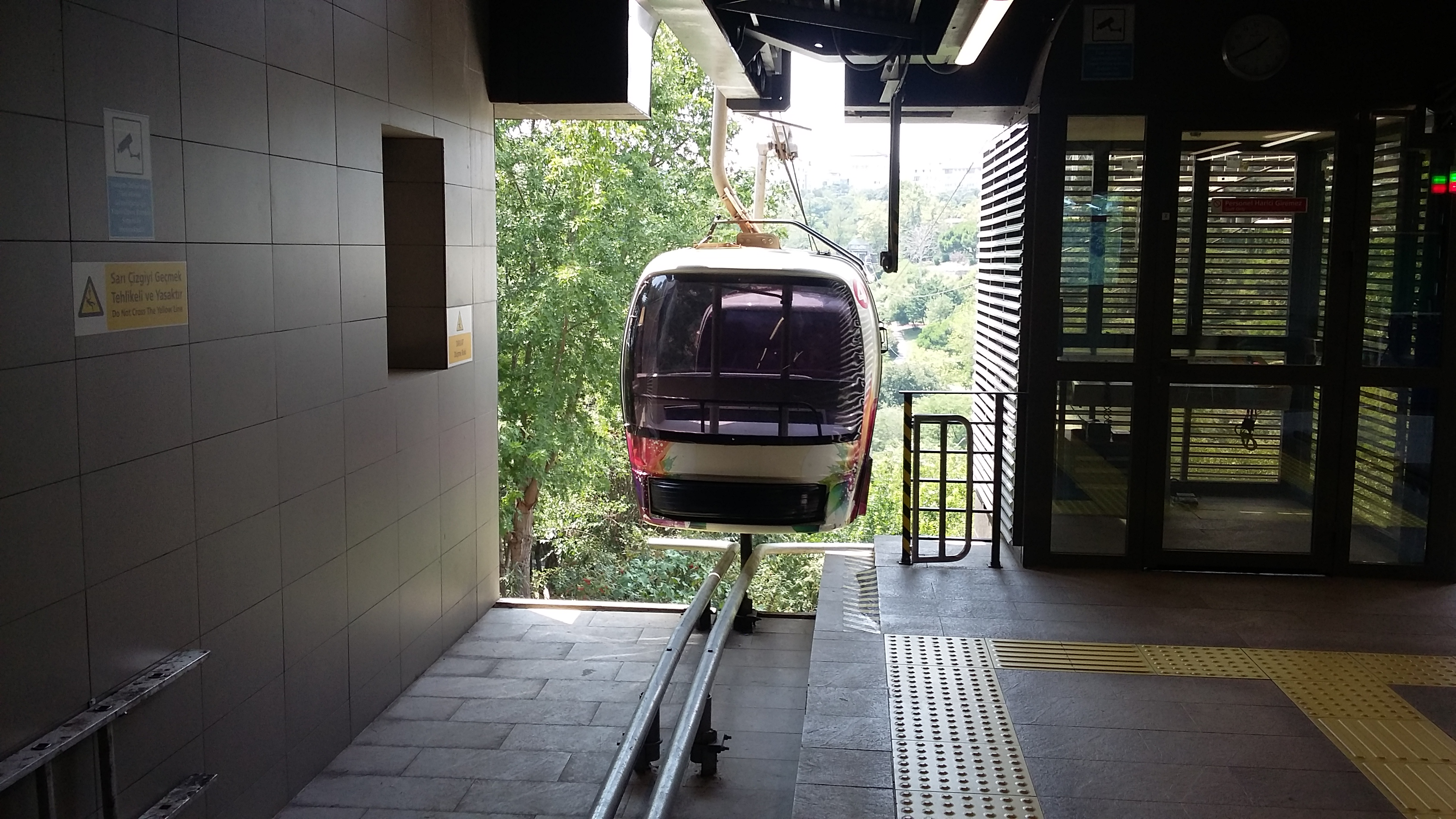 TF1 Maçka Taşkışla Teleferik